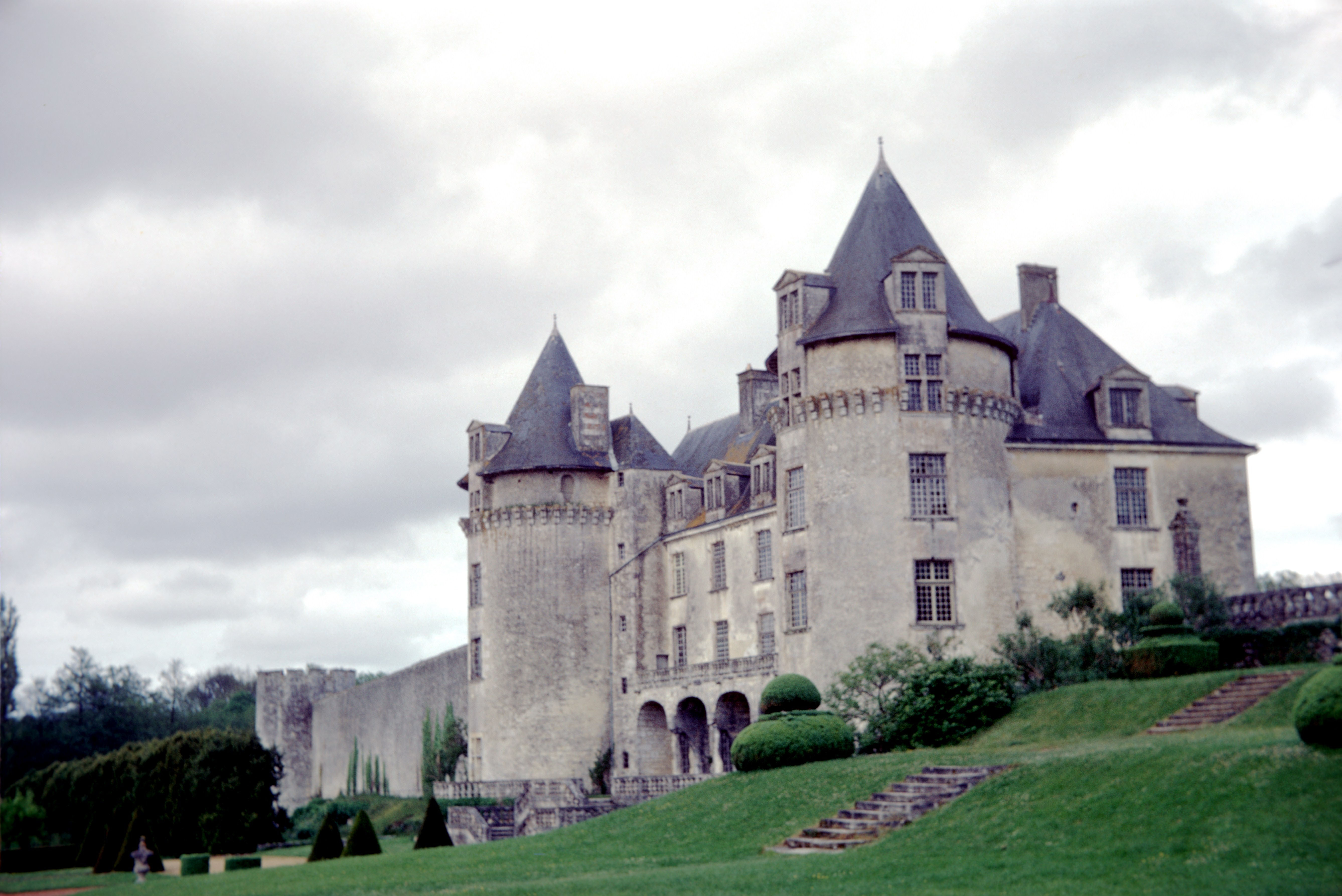 Façade Sud-Ouest du Château de la Roche-Courbon. Château de la Roche-Courbon, Saint-Porchaire, Charente-Maritime, France.